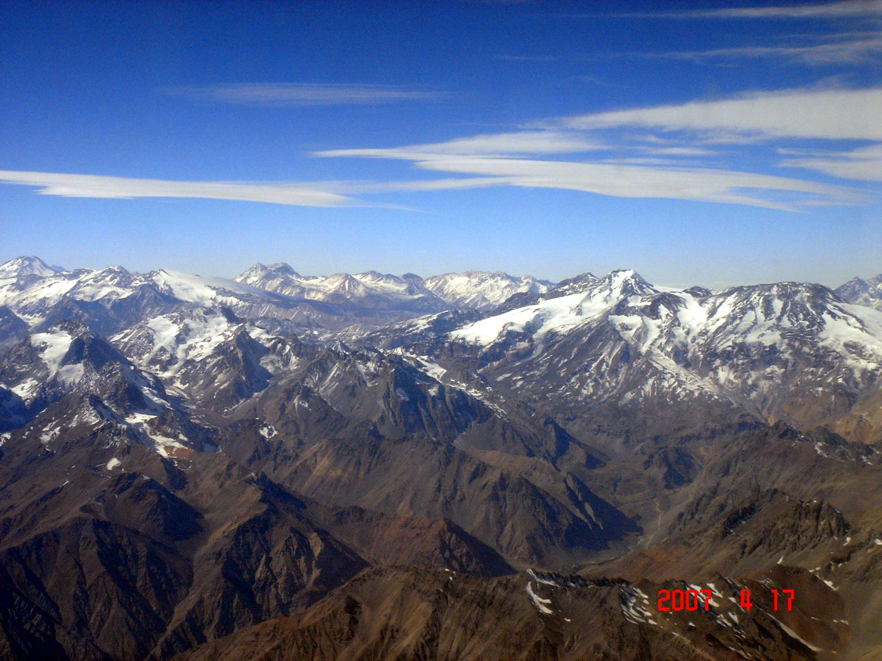 Andes, Argentina/Chile border.